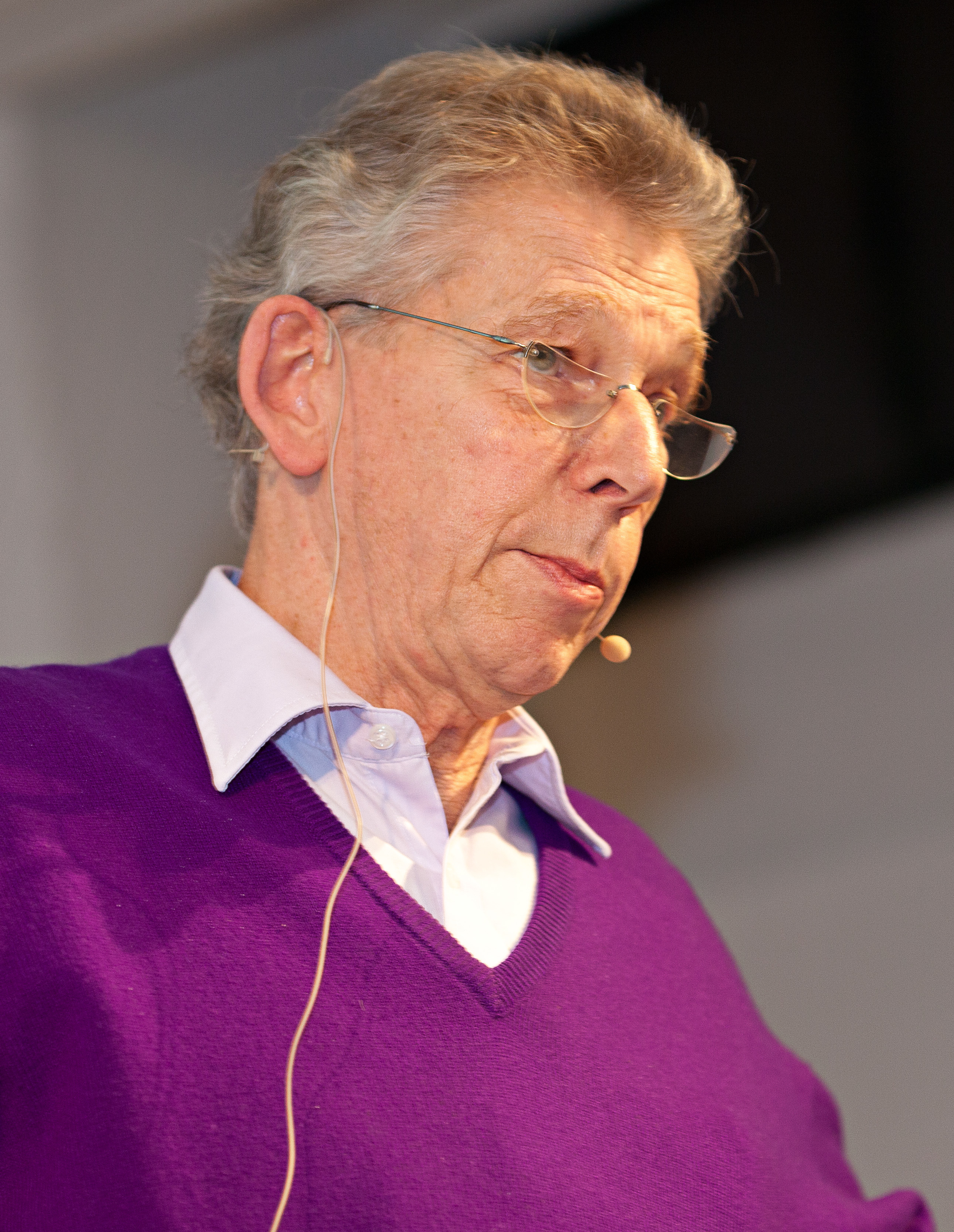 Gerard Unger auf dem Webfontday der Typographischen Gesellschaft München (tgm).